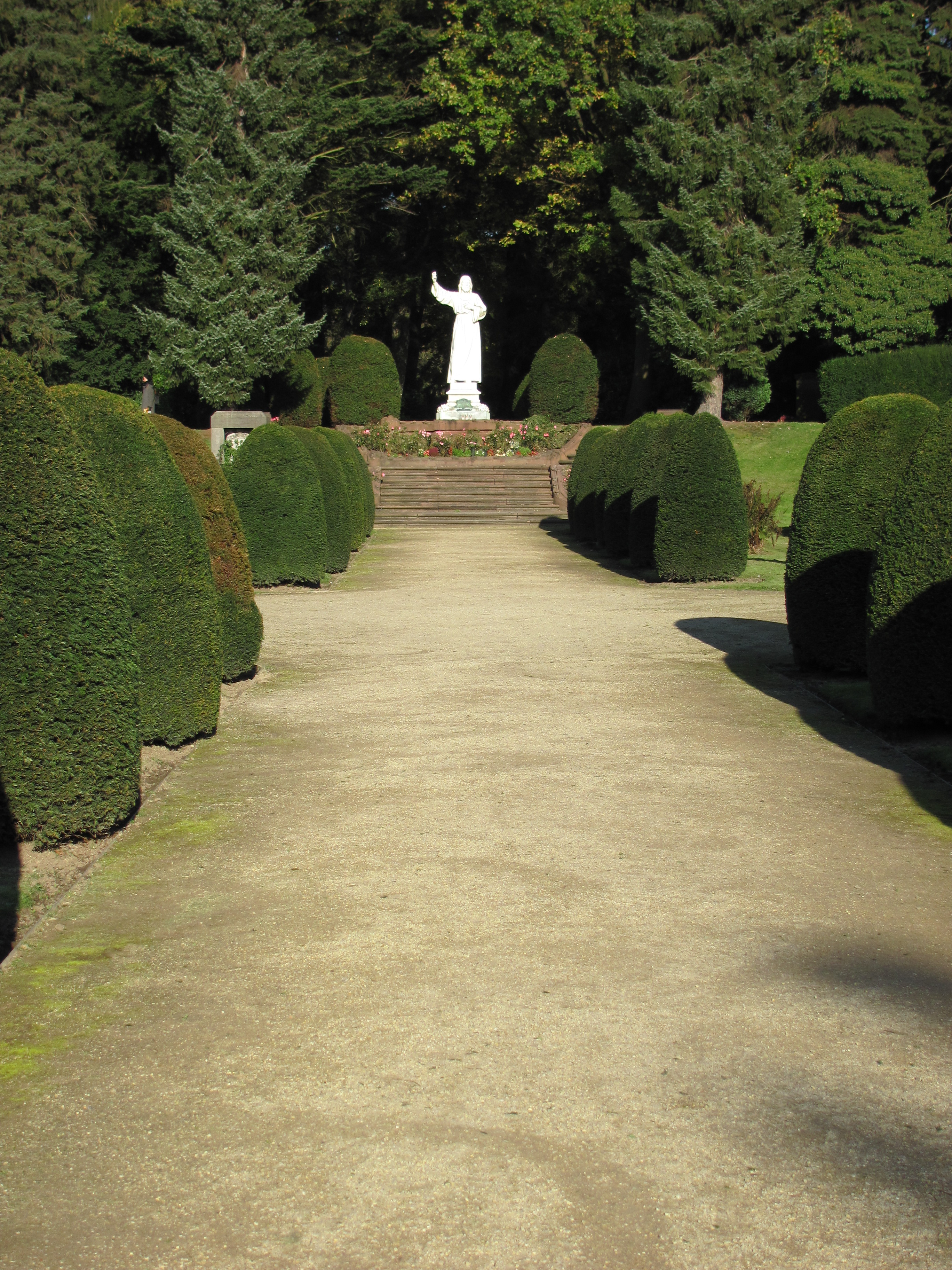 Zentralweg auf dem Althamburgischen Gedächtnisfriedhof auf dem Friedhof Ohlsdorf